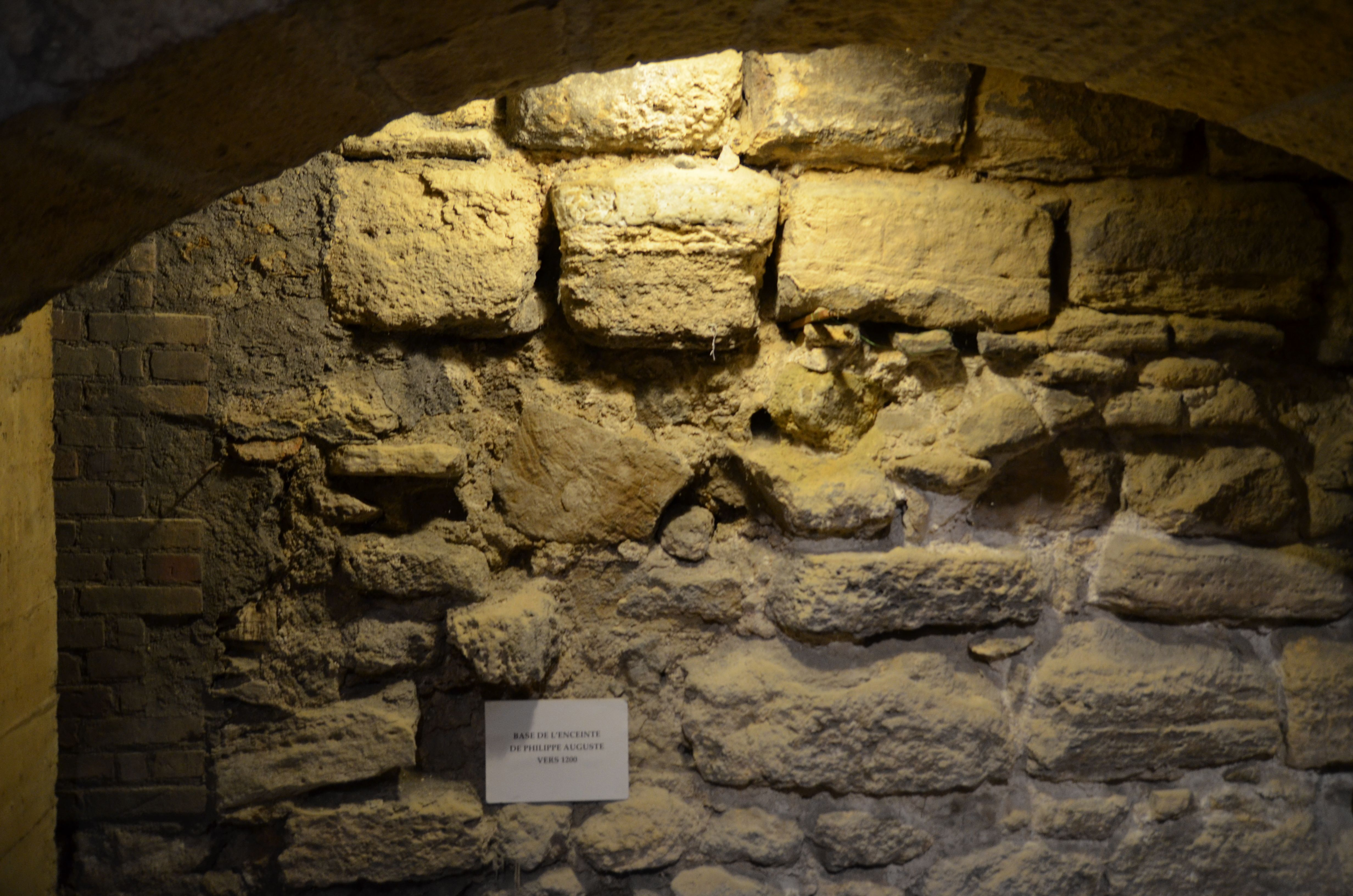 Cave de la Tour Jean-sans-Peur, base de l'Enceinte de Philippe-Auguste vers 1200.